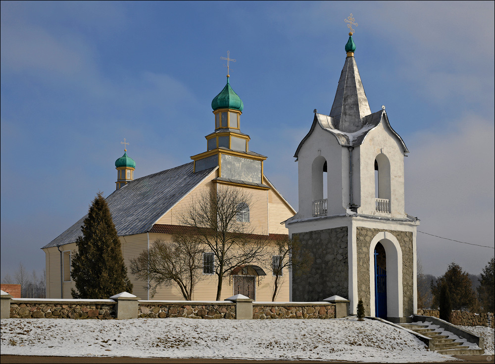 Уселюб. Царква Святога Міхаіла Архангела